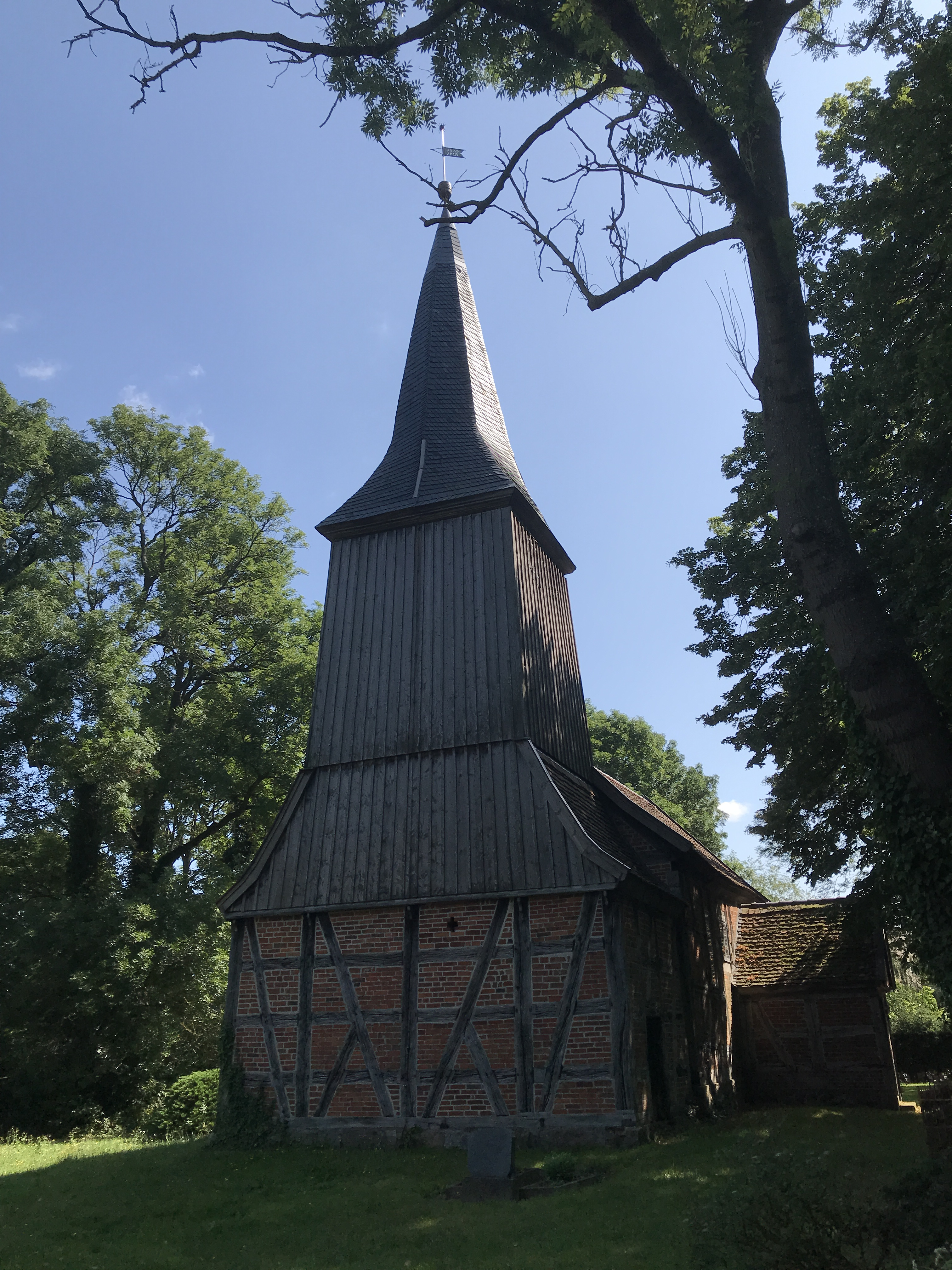 Die Dorfkirche Mildenitz im Landkreis Mecklenburgische Seenplatte ist eine Fachwerkkirche aus der Zeit um 1720/1730. Im Innern steht unter anderem ein schlichter Kanzelaltar aus der Bauzeit.